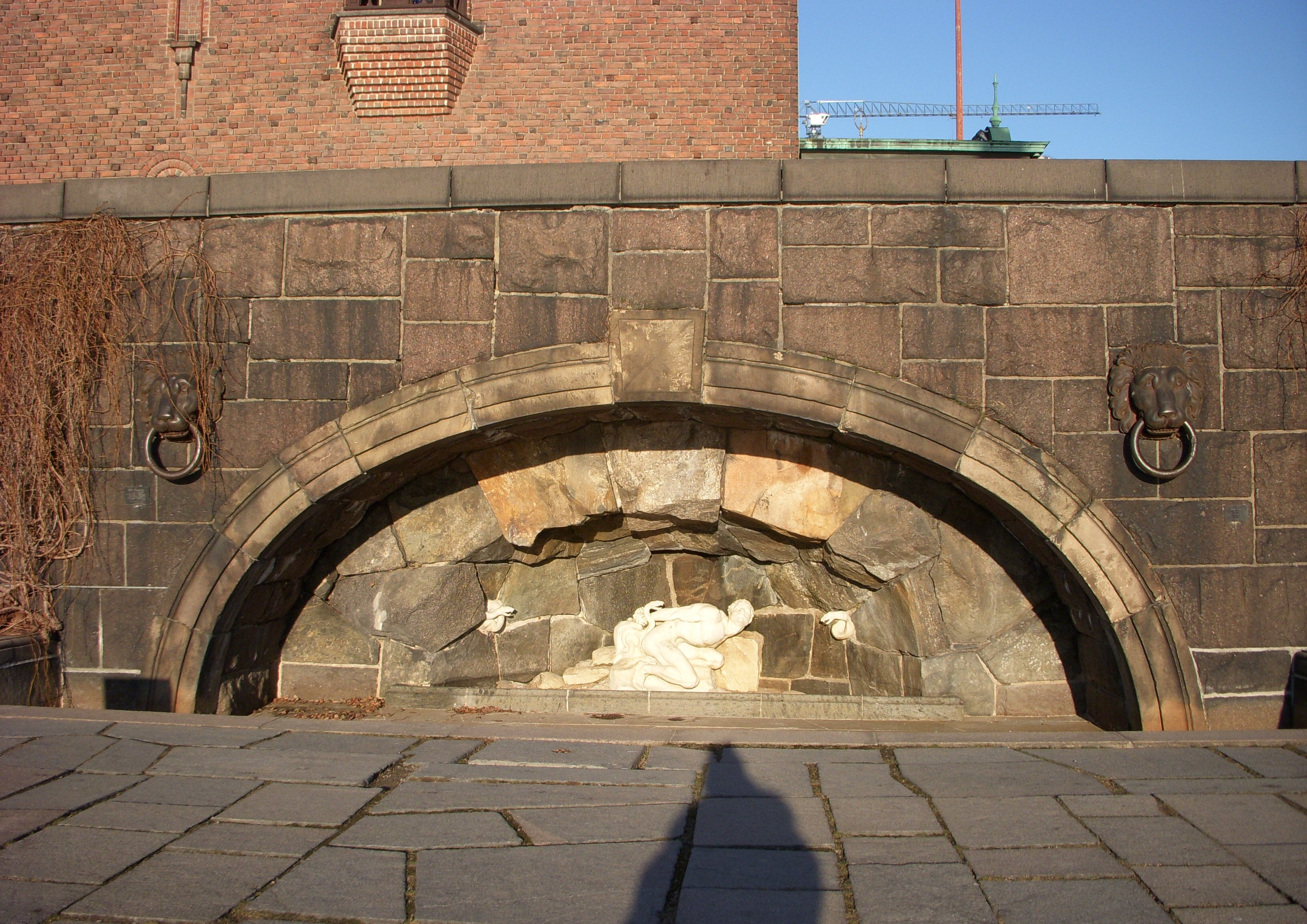 Brovalv från gamla Riddarholmsbron vid Stockholms Stadshus